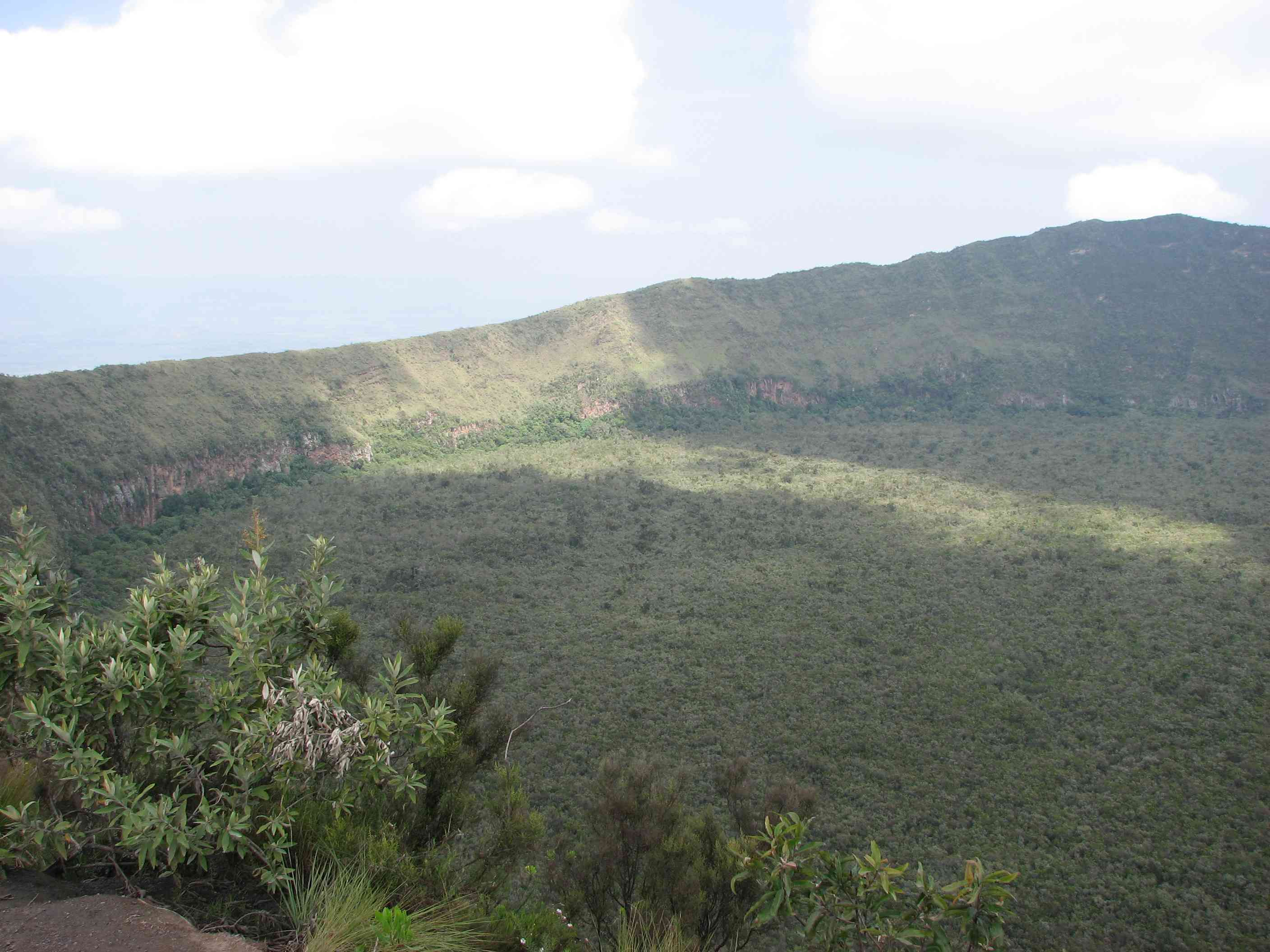 Blick in den Krater des Mount Longonot im Mount Longenot Nationalpark Kenia